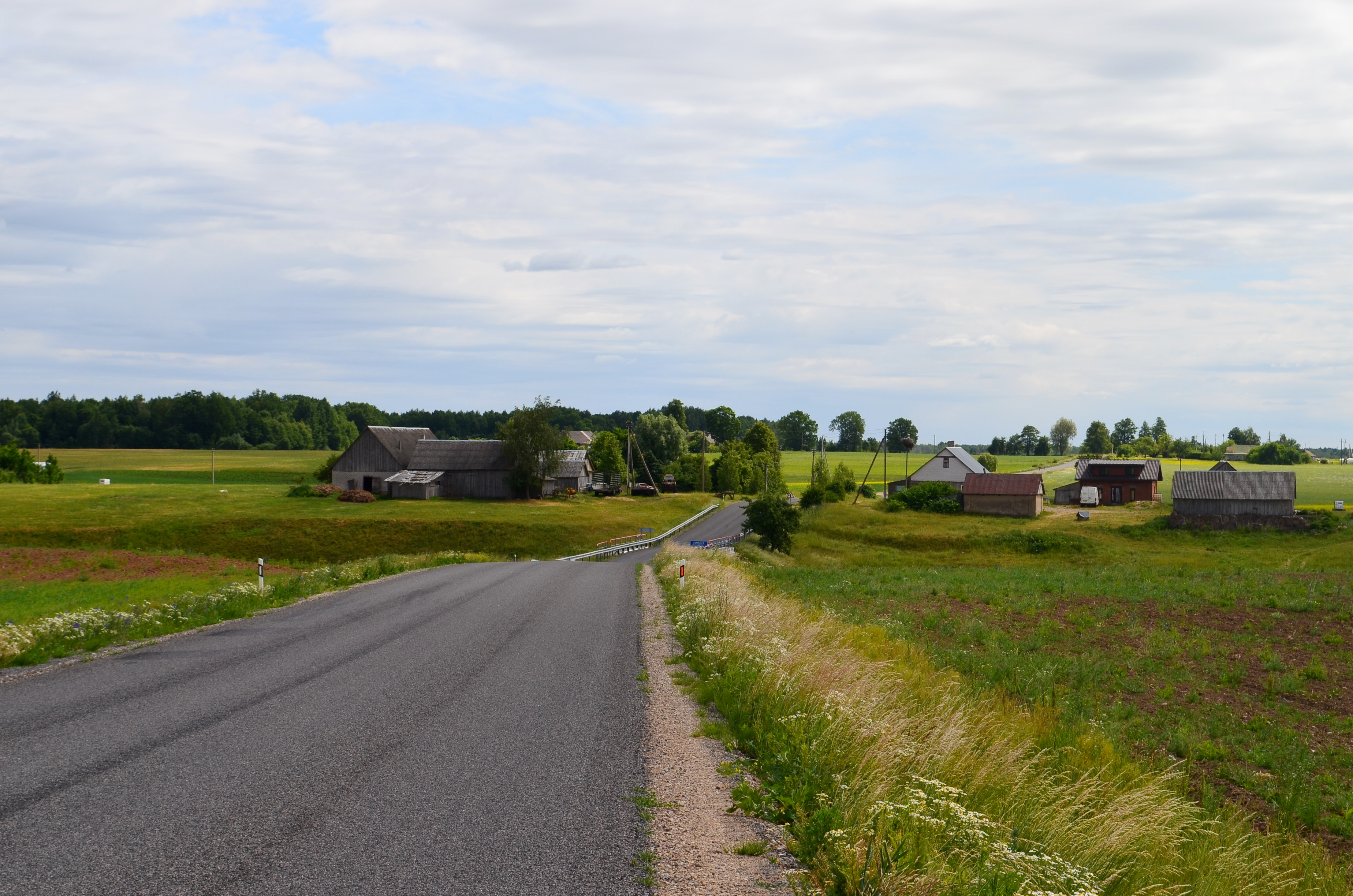 Peršėkės kaimas, Alytaus raj.